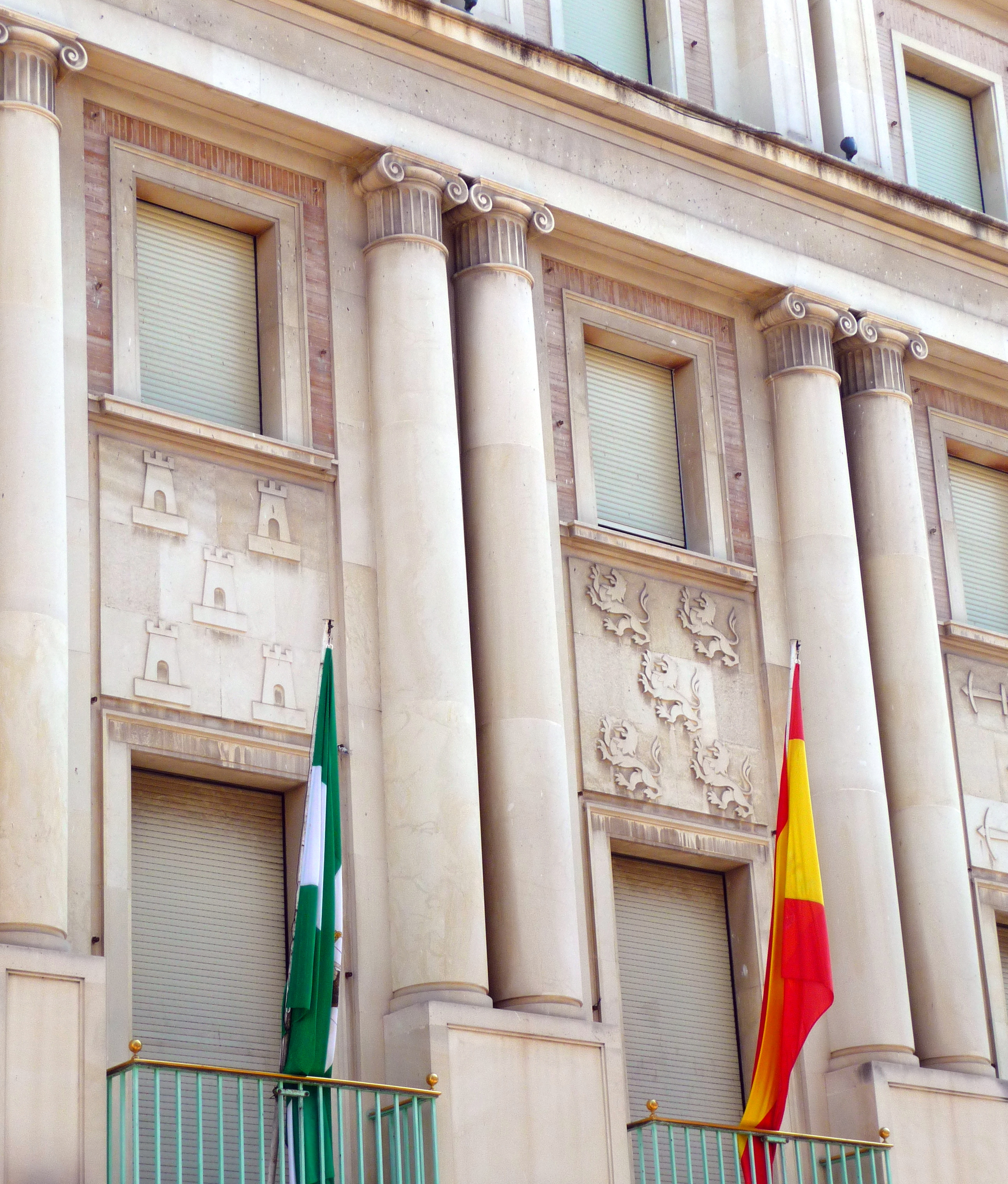 Edificio de la Diputación Provincial de Huelva.